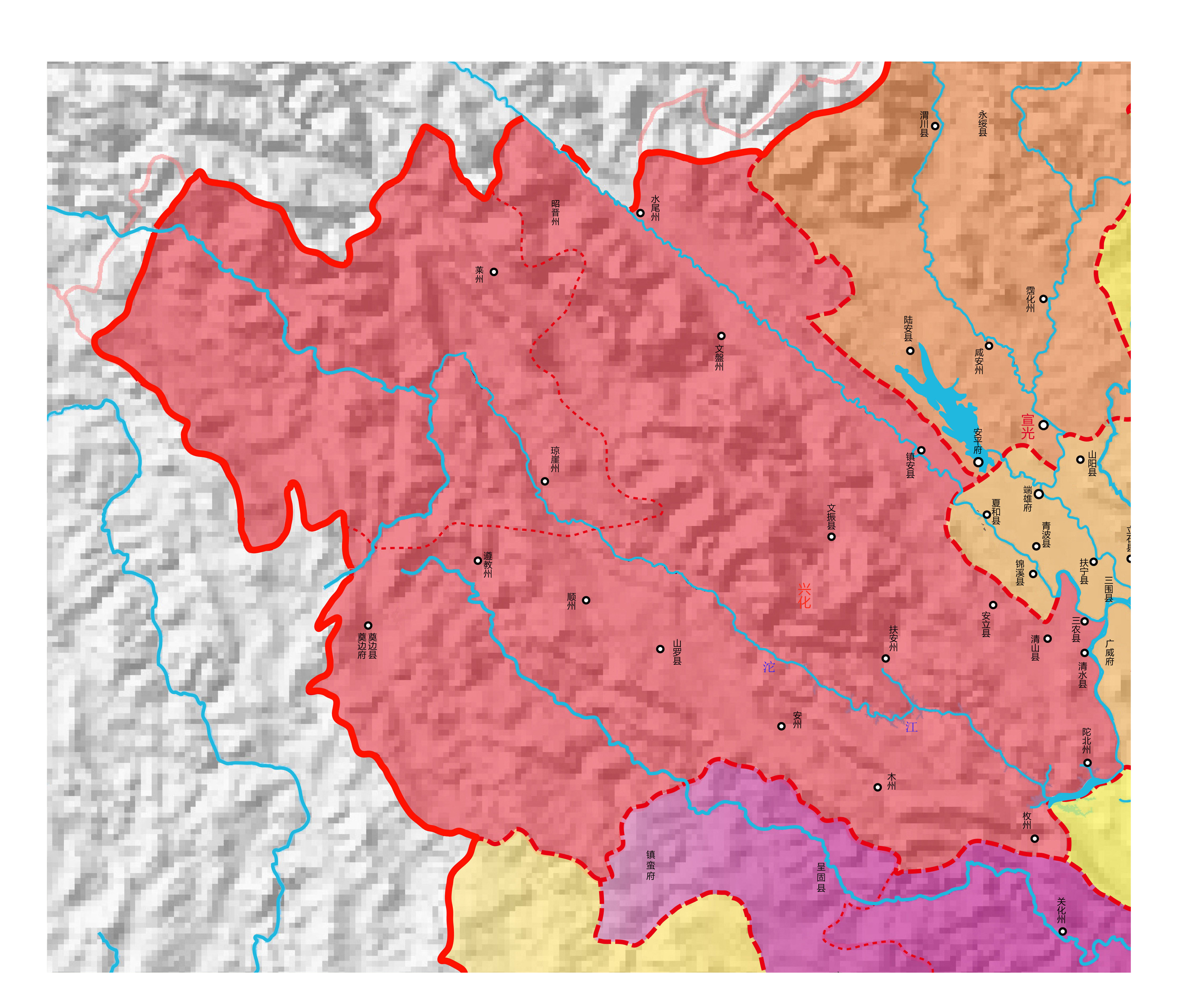 红色区域为兴化省地区